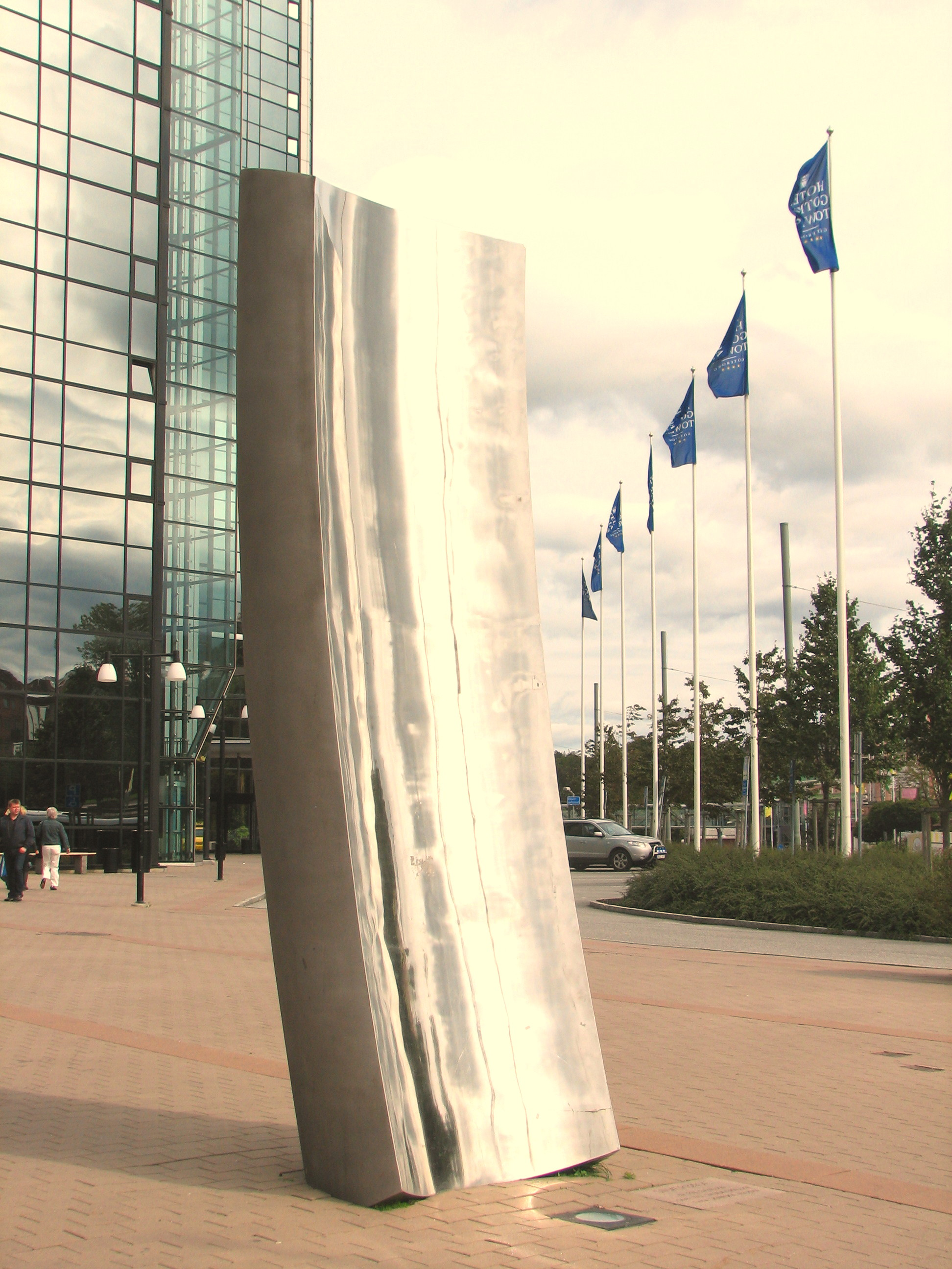 The sculpture Silverbåge (silver bow) by Pål Svensson outside Svenska Mässan in Göteborg, Sweden.